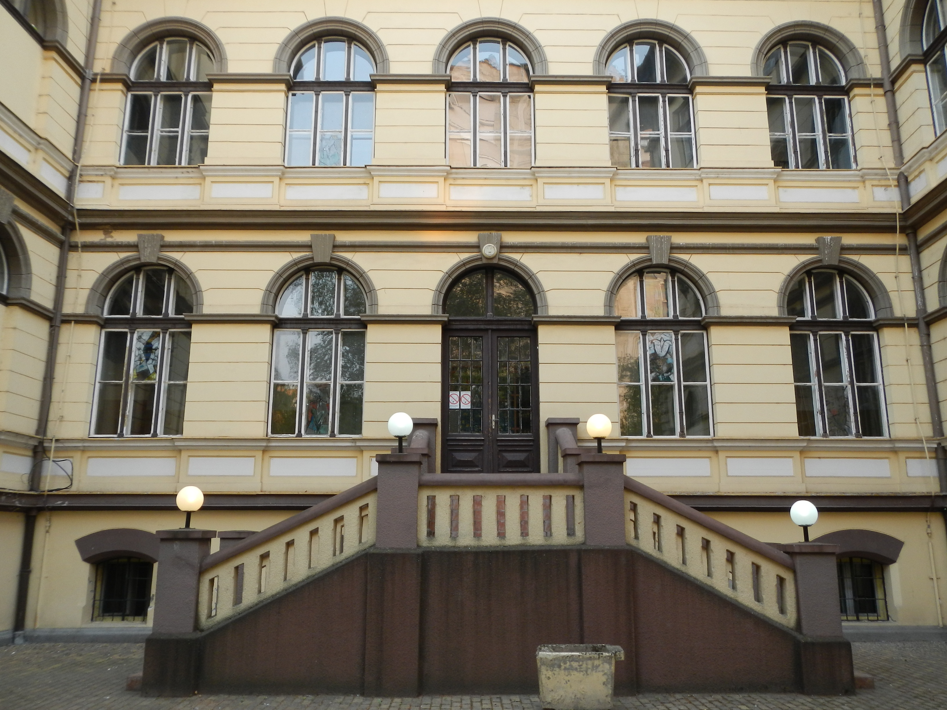 Српски (ћирилица): Источна фасада